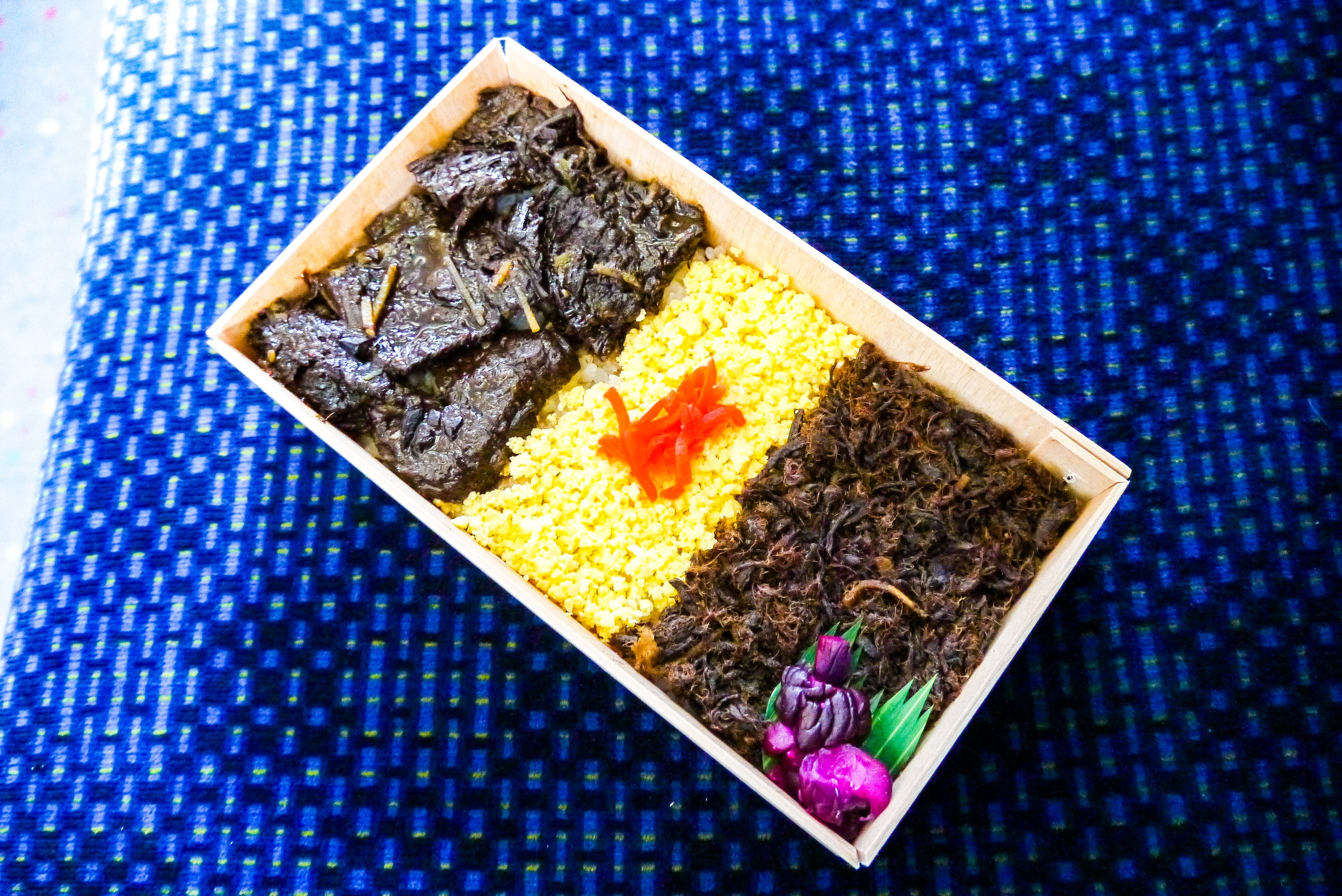 千葉県館山市、くじら弁当、館山駅、駅弁